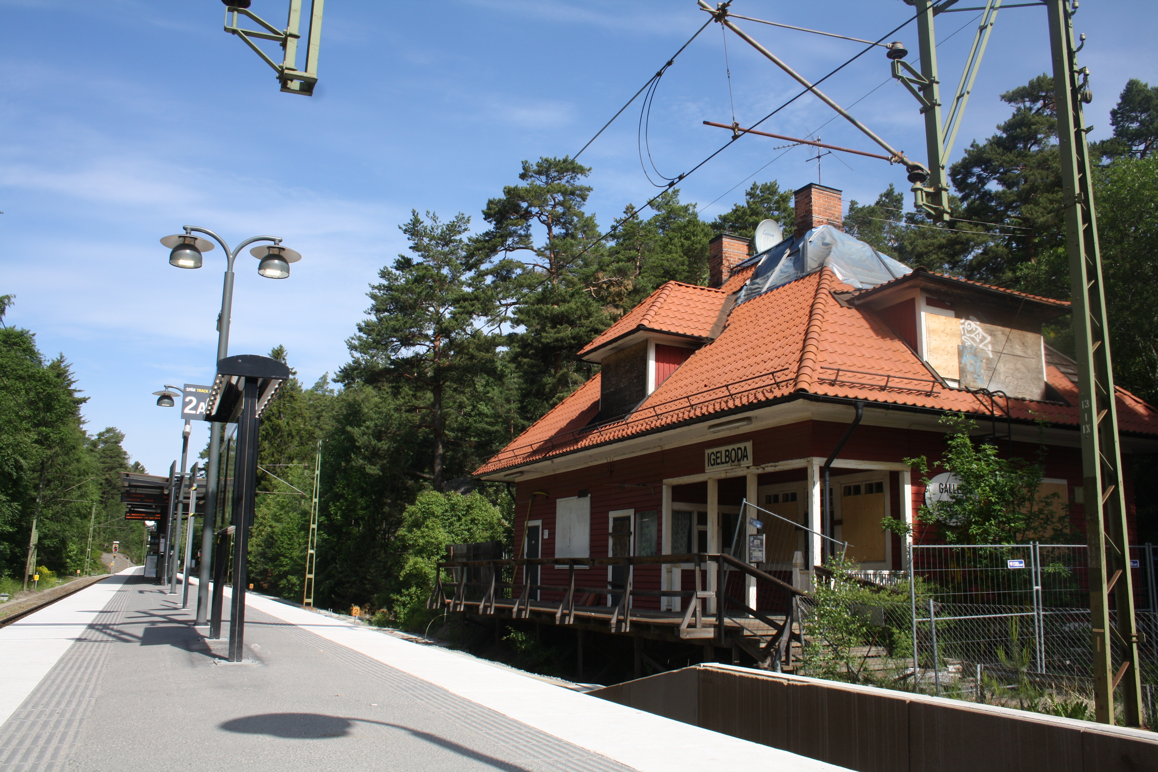 Igelboda